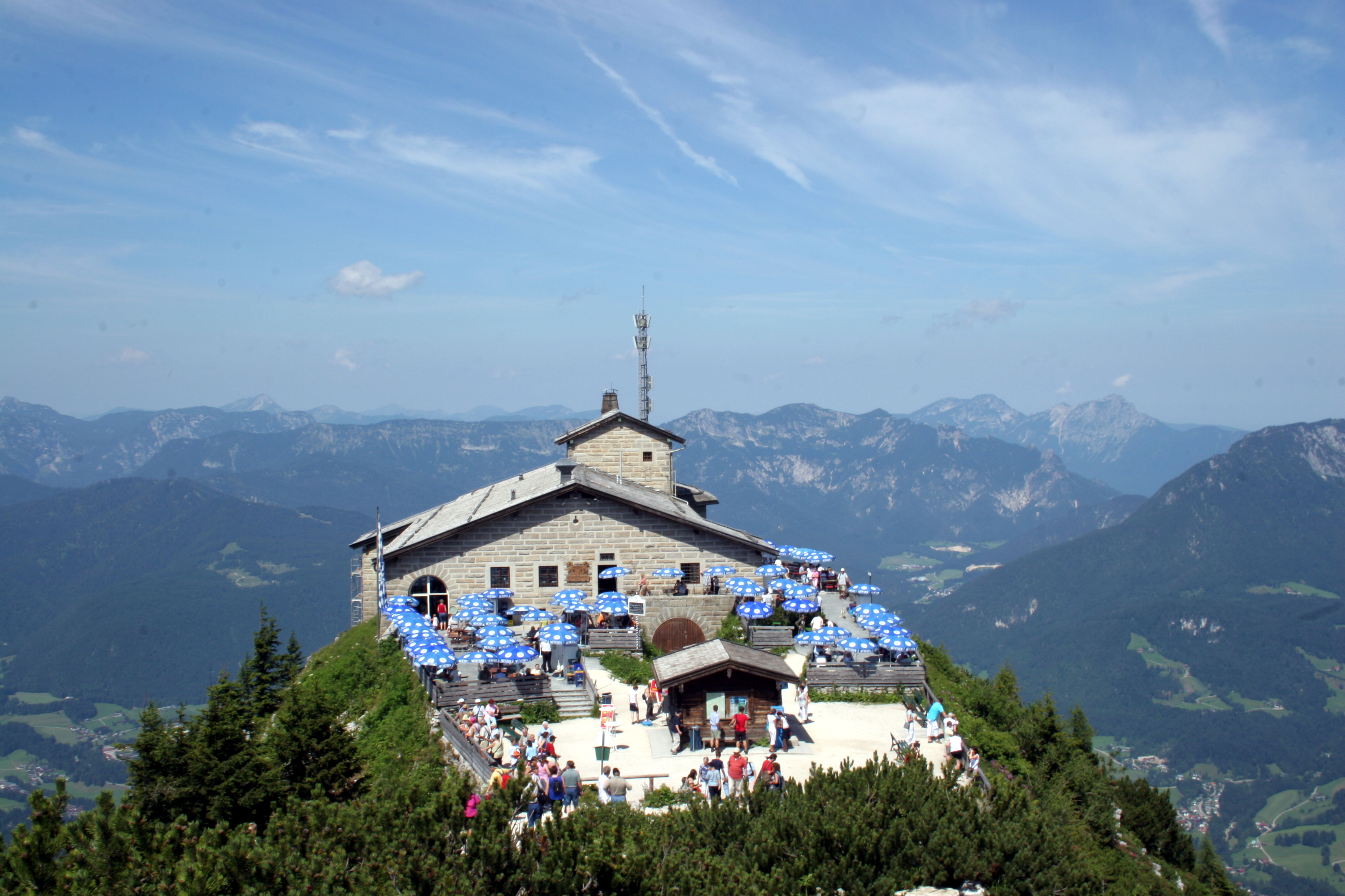 Kehlsteinhaus, Obersalzberg, Bayern, Germany. Hitler's "teahouse". Built under Bormann's supervision for Hitler's 50th birthday.